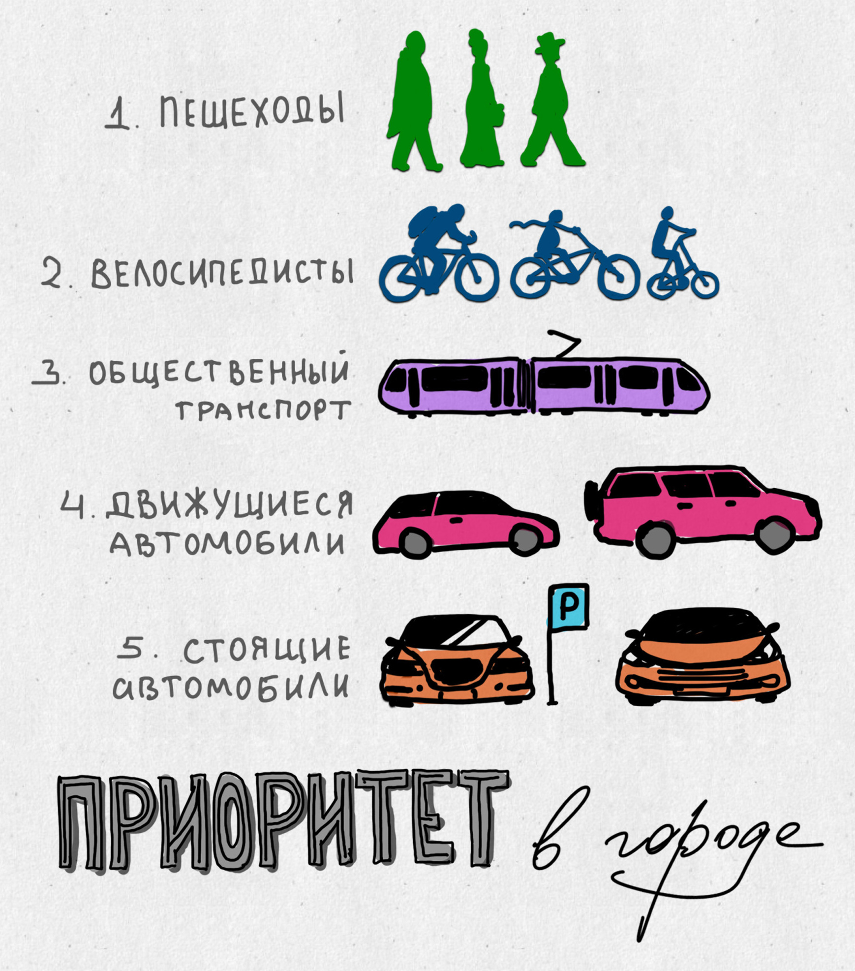 «Приоритеты в городе» — иллюстрация для «Городских проектов» Ильи Варламова и Максима Каца. Настоящим я, Евгений Решетнёв, заявляю, что являюсь законным владельцем этого изображения: Я доверяю загрузку на сервер wikimedia и проведение лицензирования этого изображения участнику kf8. Я согласен опубликовать данное изображение, на условиях свободной лицензии cc-by-3.0 или любой более новой, опубликованной Фондом Свободного Программного Обеспечения (Free Software Foundation). Я понимаю, что тем самым даю право любому лицу распространять, изменять и использовать загруженные на сервер wikimedia материалы в любых законных целях (в том числе связанных с извлечением коммерческой выгоды) при условии соблюдения указанной лицензии. Я уведомлён, что я сохраняю исключительные авторские права на свои работы вне условий указанной лицензии, и что я всегда сохраняю право на упоминание меня как автора в соответствии с выбранной лицензией. Модификации, которые сделают другие люди, не будут приписаны мне. Данное разрешение затрагивает только мои исключительные авторские права, и я оставляю за собой право предпринимать действия против использования моей работы с нарушением закона, в частности, для клеветы, унижения чести и достоинства, нарушения правил использования торговых марок, нарушения права на охрану изображения гражданина и т. д. Я понимаю, что я не могу отозвать данное разрешение, и что моя работа может размещаться в проектах Фонда Викимедиа в течение неограниченного времени, либо быть удалённой оттуда администрацией ресурса. 1.12.2012 Евгений Решетнёв Вы при желании можете связаться со мной на моём сайте